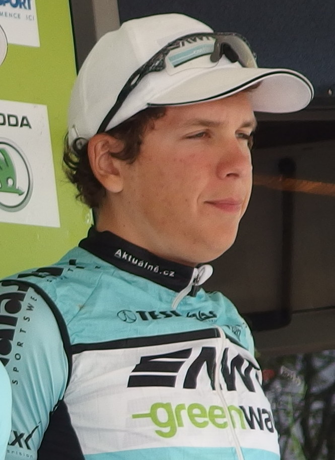 Tour de Bretagne 2015 - Présentation des équipes au départ de la troisième étape à Baud - Équipe AWT-Greenway Depicted person: Michal Schlegel